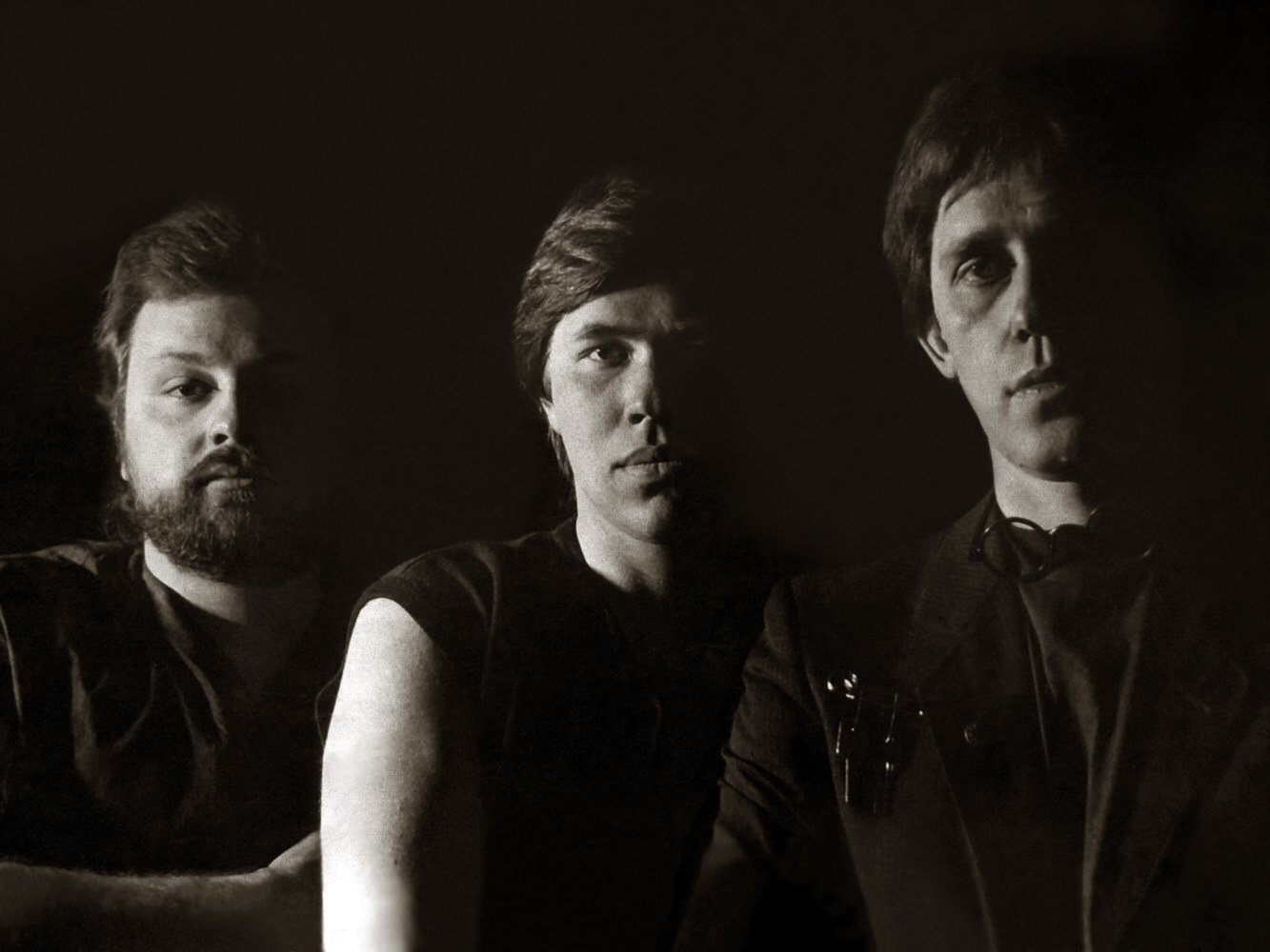 Садъ 90-е. 1990 г.